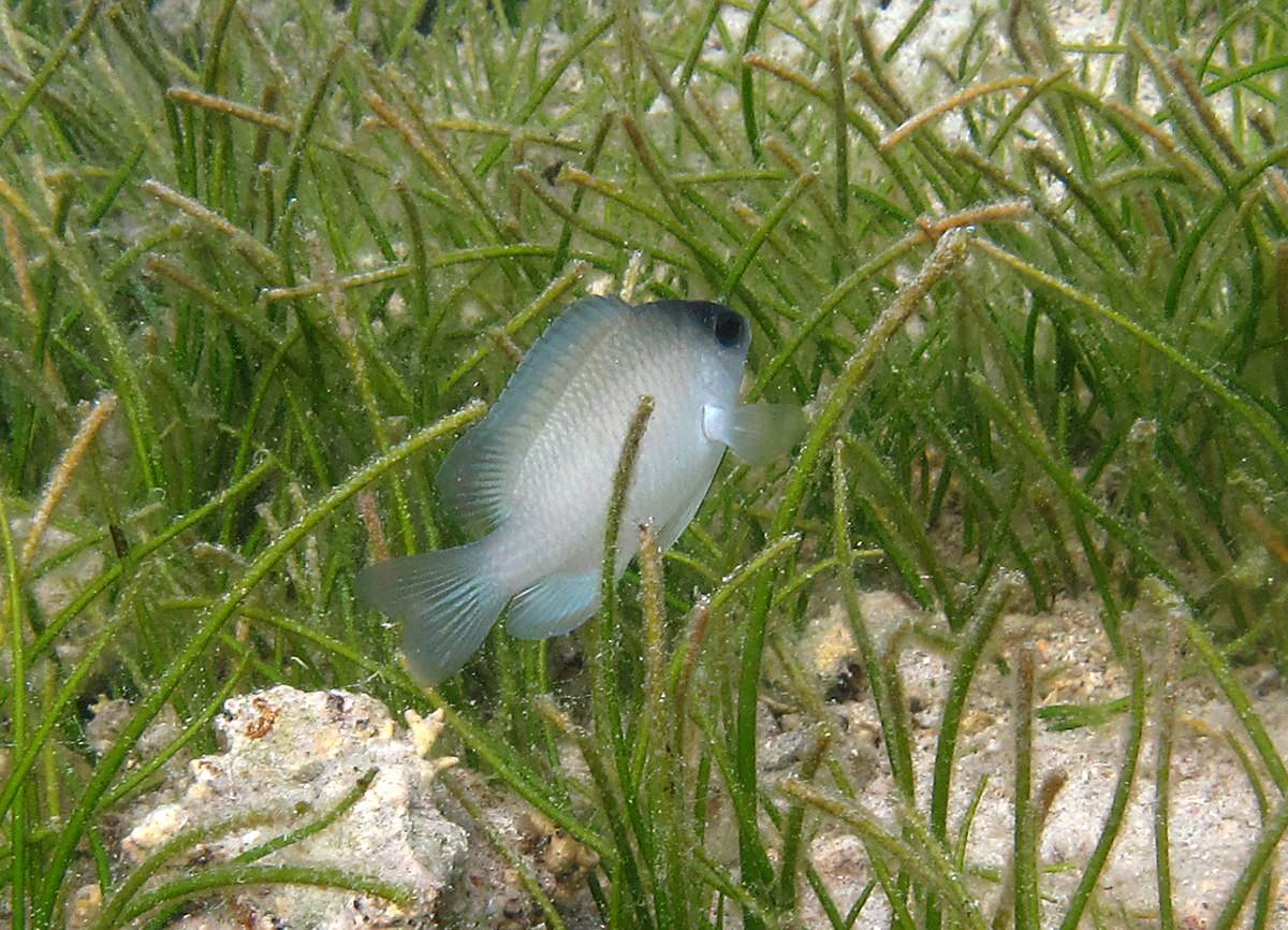 Une demoiselle grise (Chrysiptera glauca) à la Réunion.